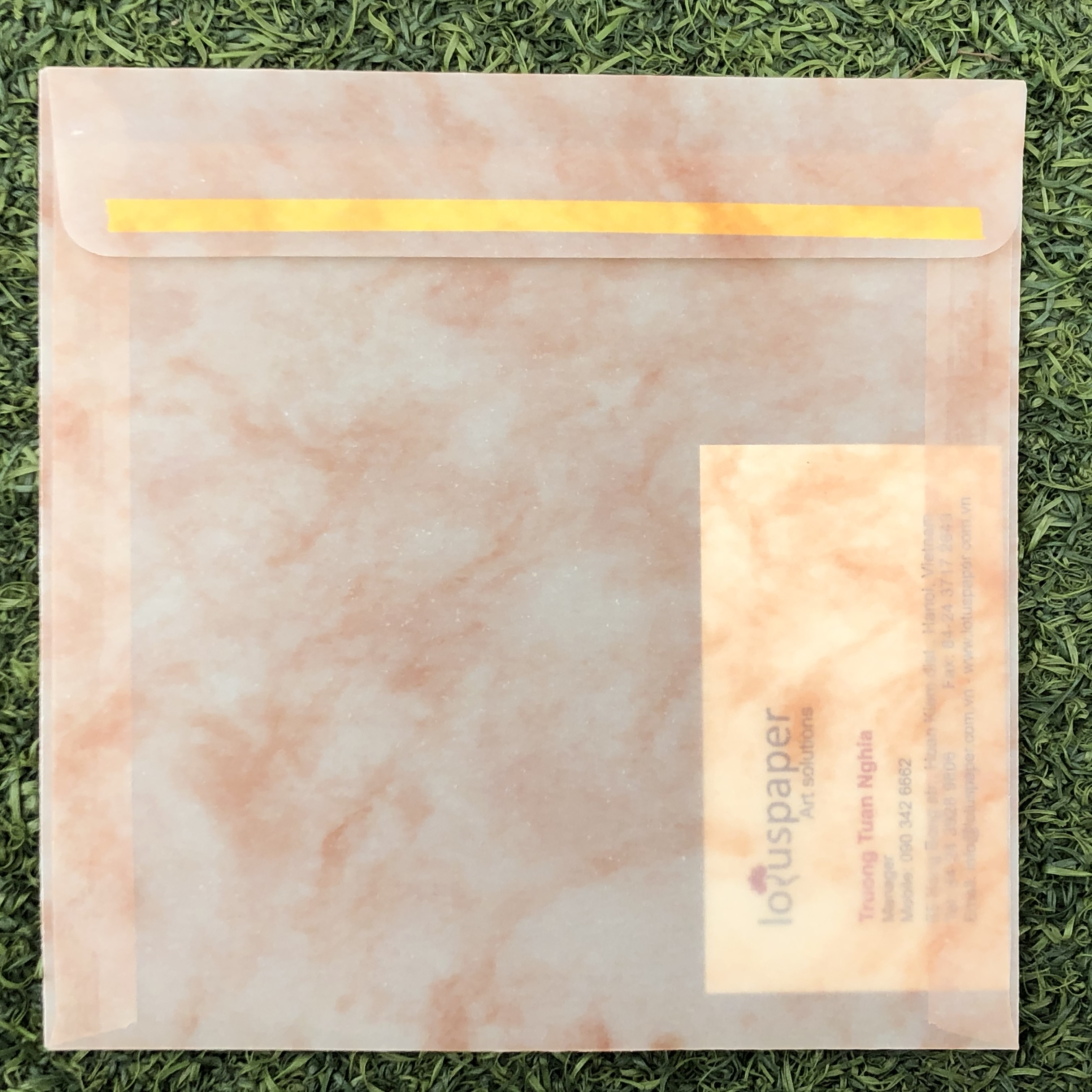 Phong bì giấy can mỹ thuật với băng dính 2 mặt và danh thiếp